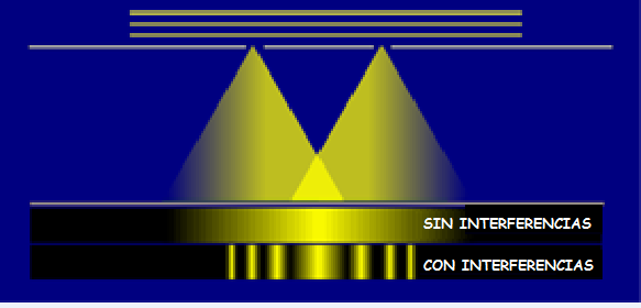 Detalle de un foco con y sin interferencias